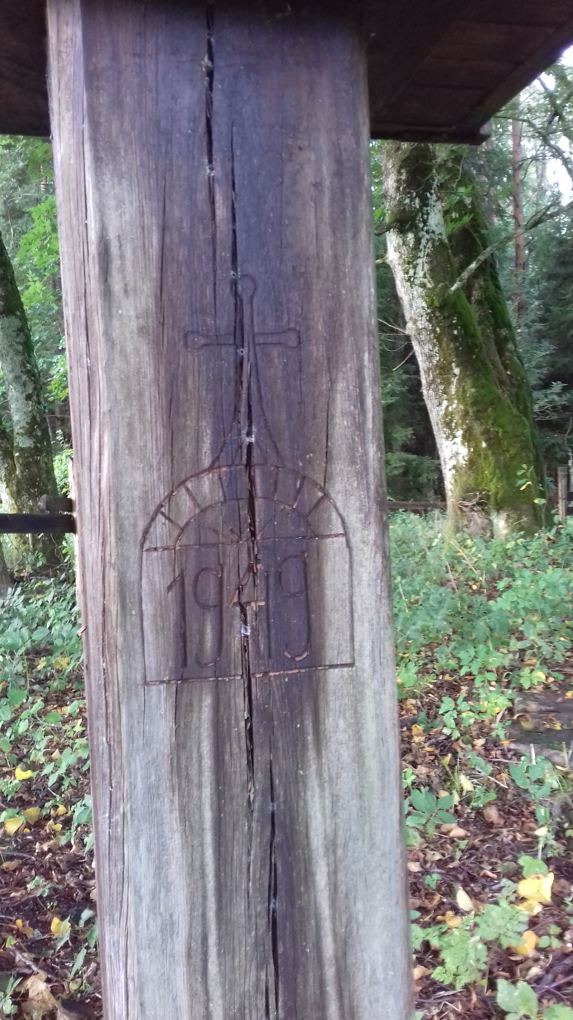 Išraižyta data ant koplystulpio